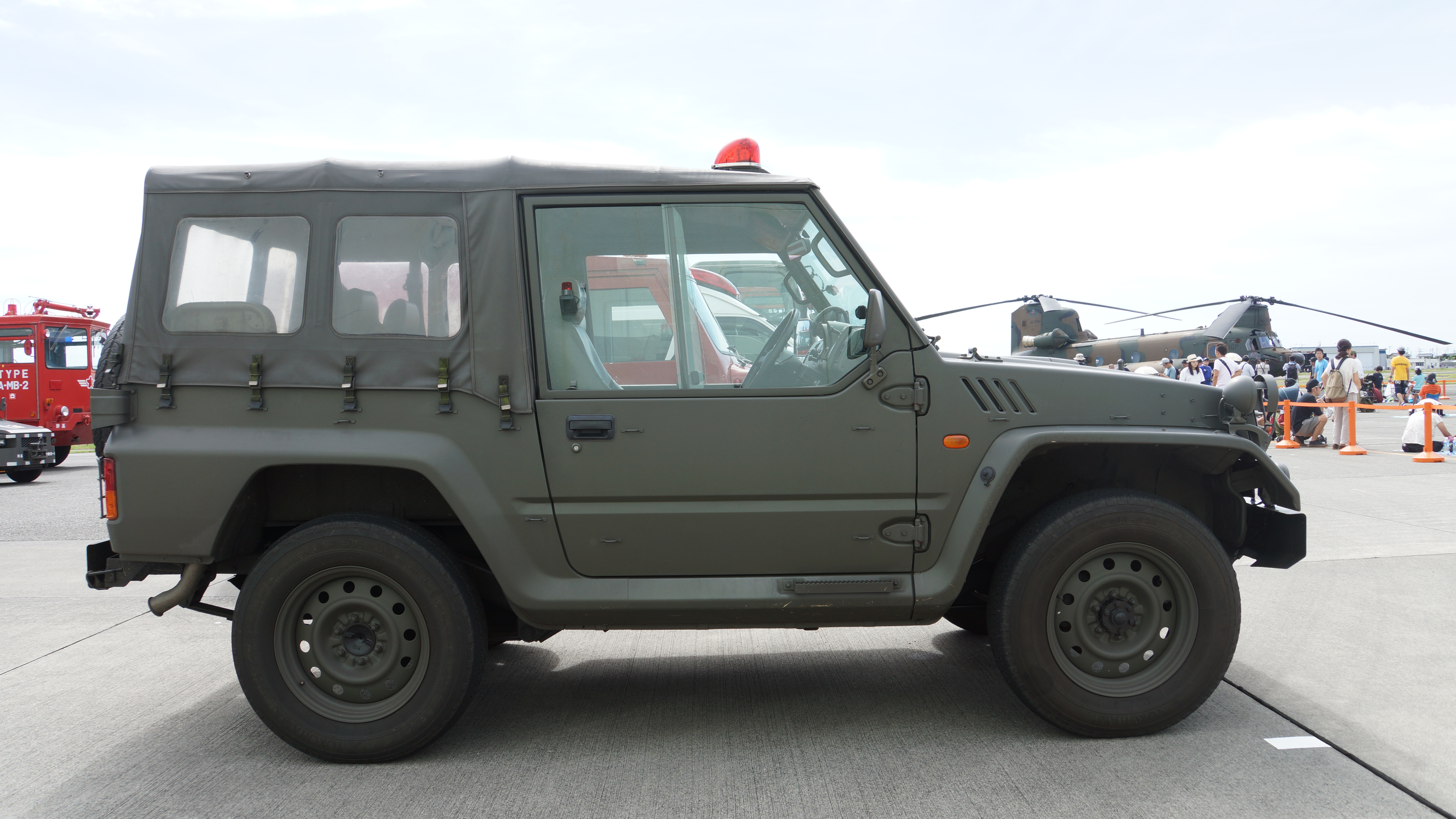 航空自衛隊 73式小型（1/2t）トラック（45-7564号車） 右側面。2016年9月25日 静浜基地にて。